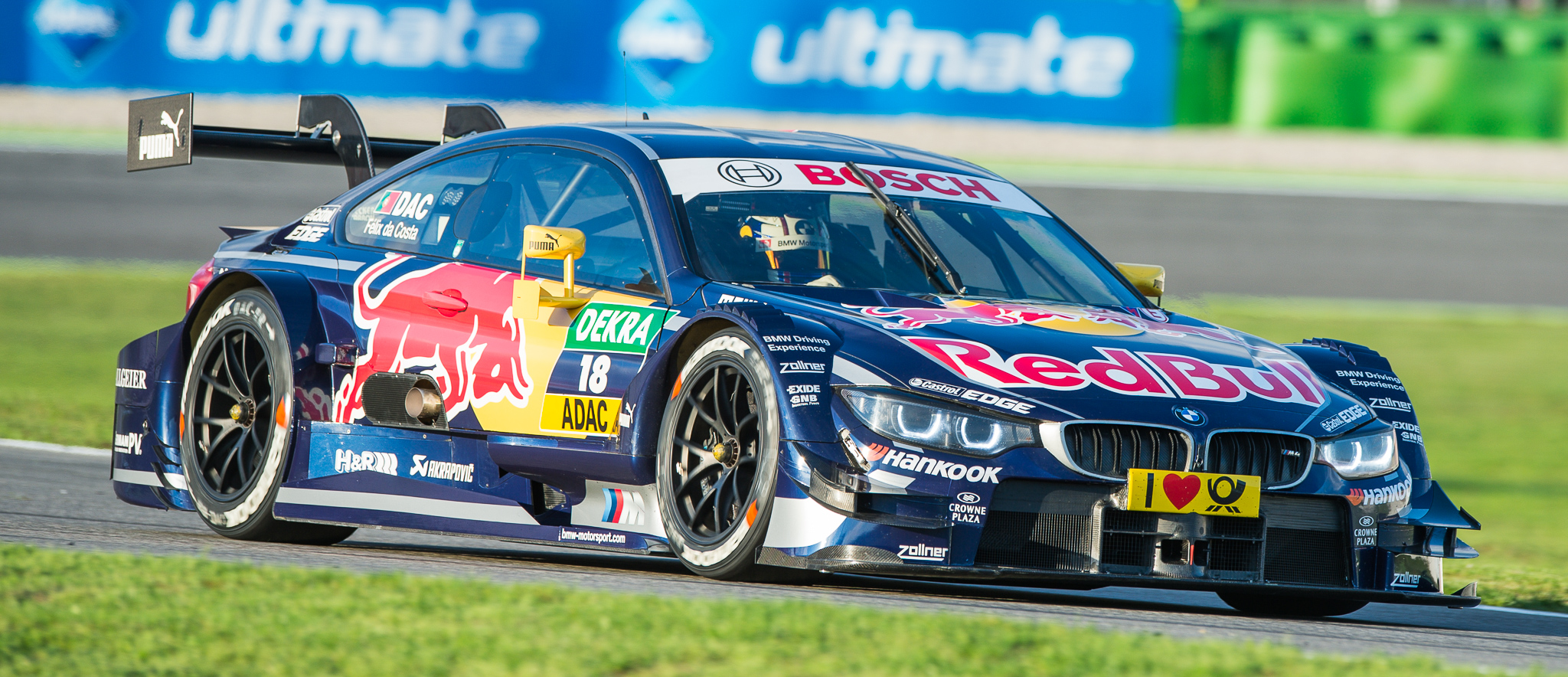 Antonio Felix da Costa,DTM,Deutsche Tourenwagen Masters,Hockenheimring,MTEK GmbH,Motorsport,Red Bull BMW M4 DTM